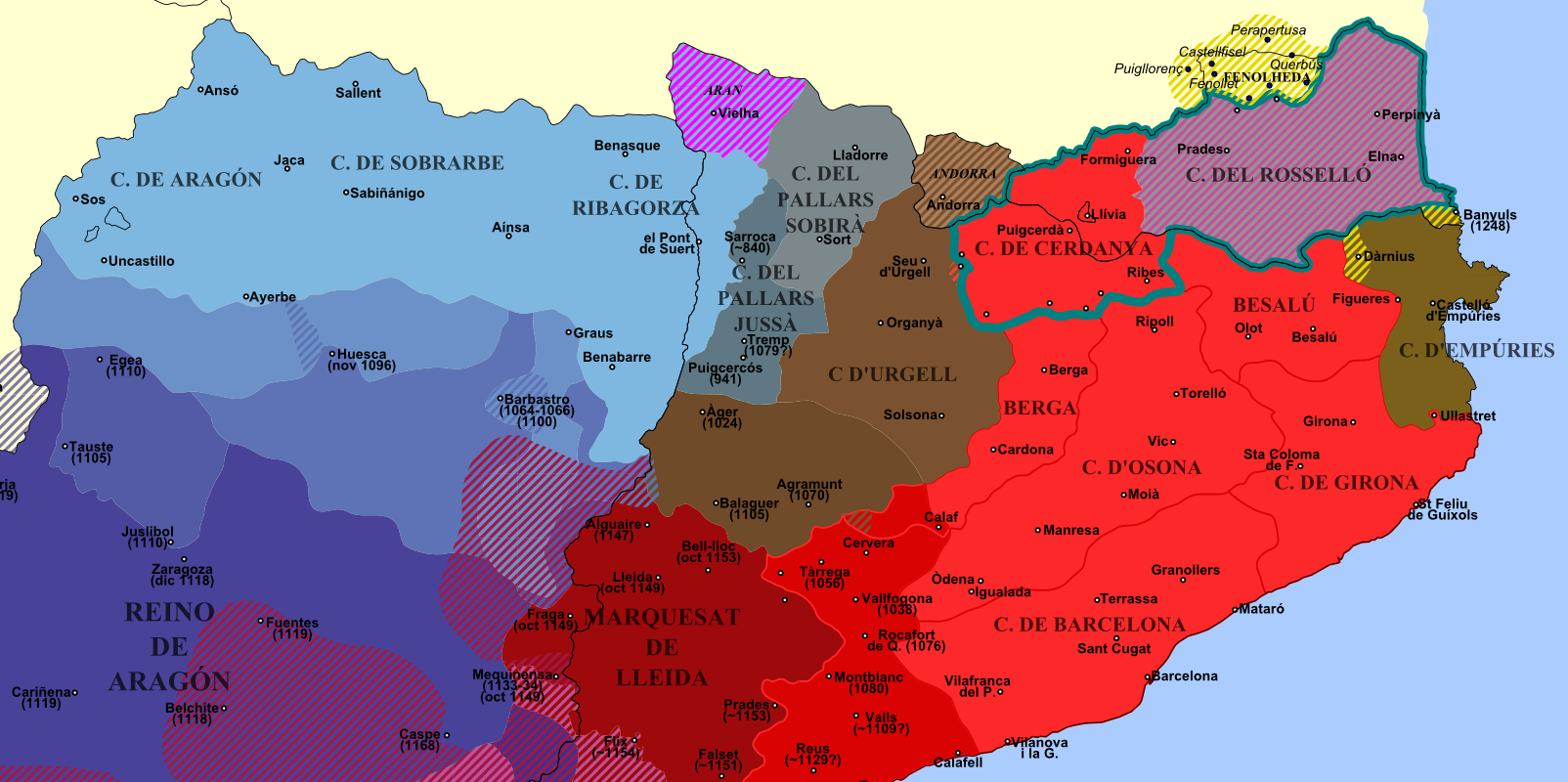 Aragonés: Mapa de la expansión de la Corona de Aragón en territorio balear y peninsular coloreado según monarcas y fases de conquista y fechado. Proyección de Mercator. Detalle.